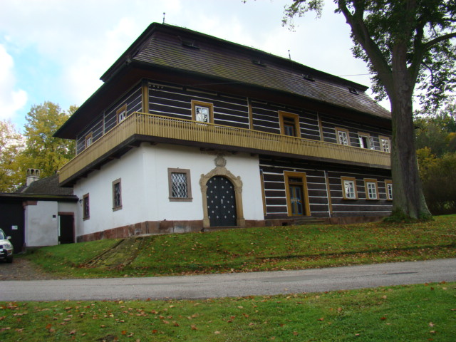 Pohled na Tuláčkův statek v Kruhu u Jilemnice